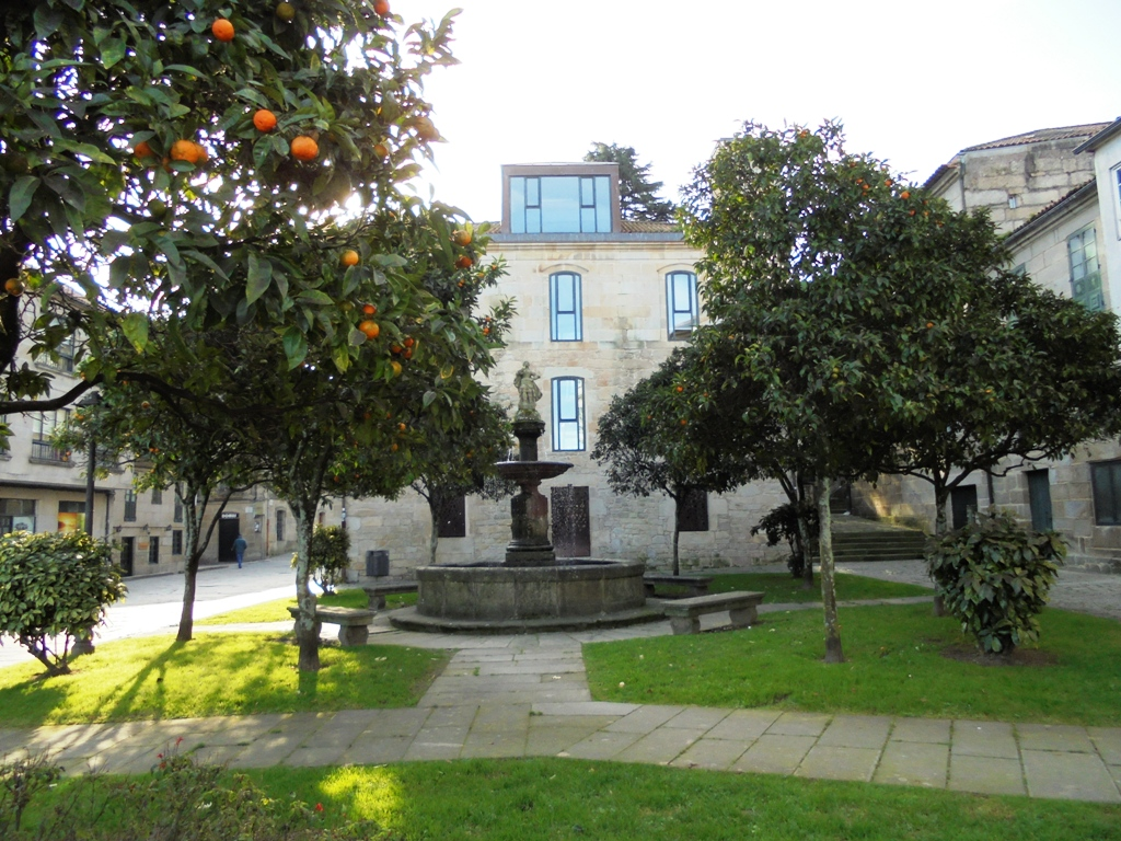 Plaza del Muelle Pontevedra capital